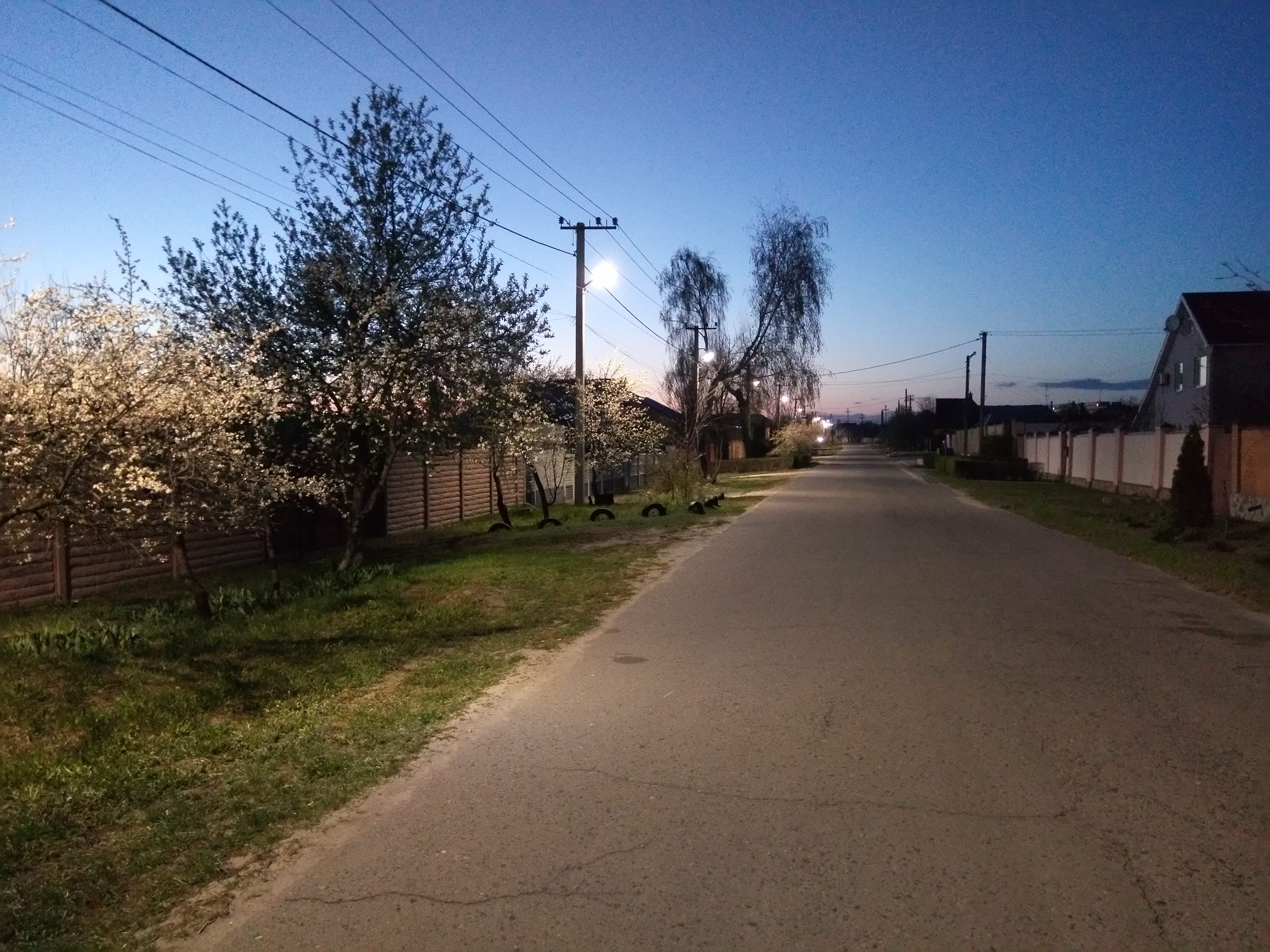 Вечірній вигляд вулиці Садової у місті Дергачі (Харківська область) під час розквіту дерев.